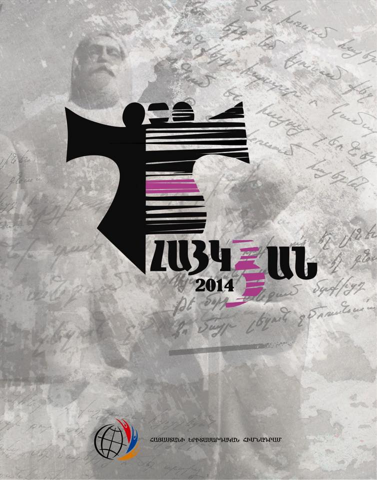 Երիտասարդական մրցանակաբաշխություն